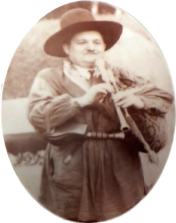 Portrait de Martin Cayla, joueur de musique auvergnate